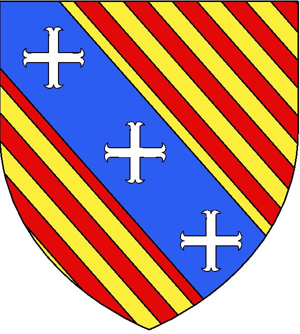 Blason Jehan Bernier Prévôt de Paris de 1362 à 1384